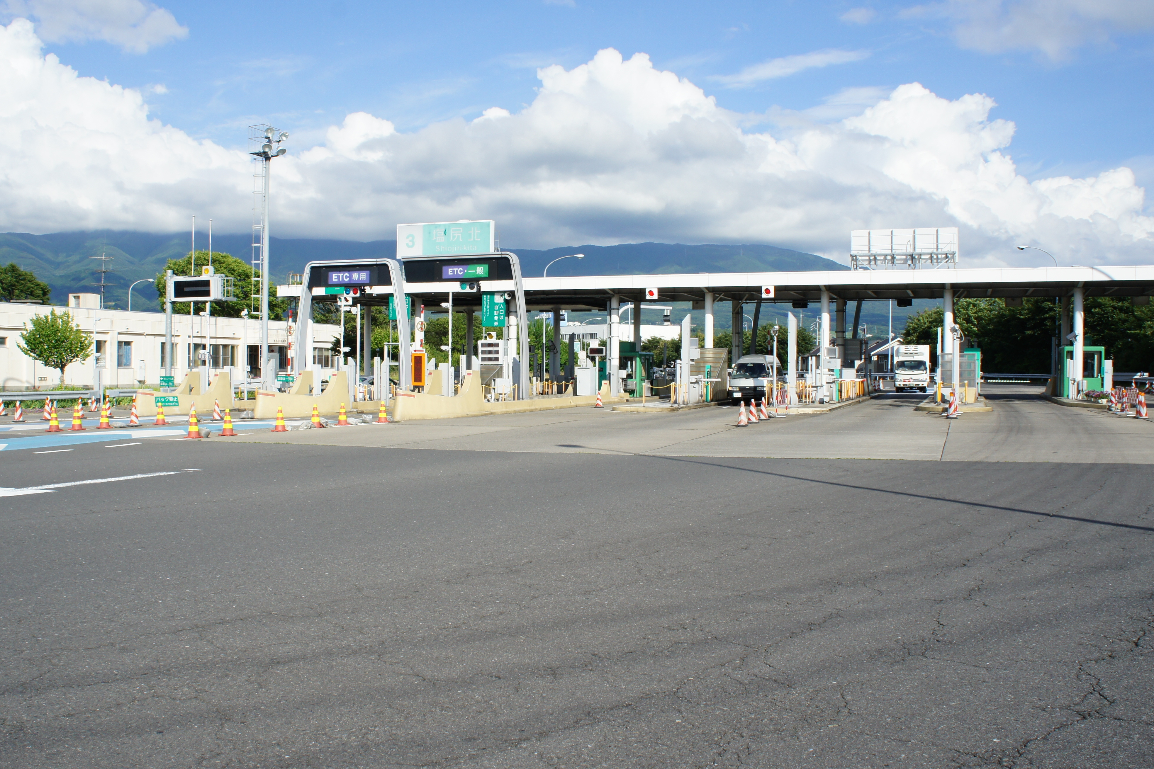 塩尻北インターチェンジ, 長野県塩尻市